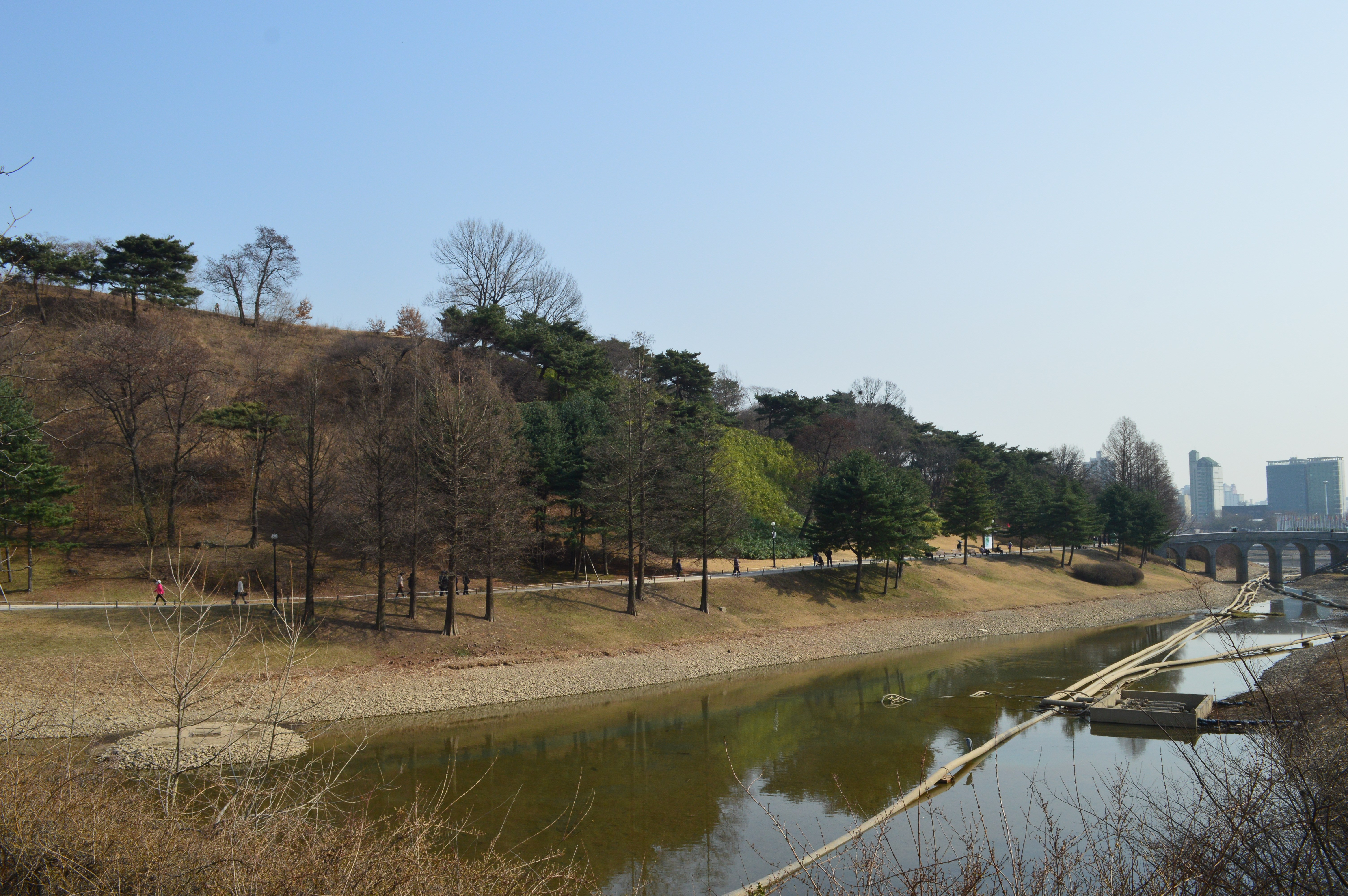 夢村土城 土塁